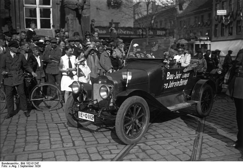 Jahrtausendfeier in Brandenburg a/Havel